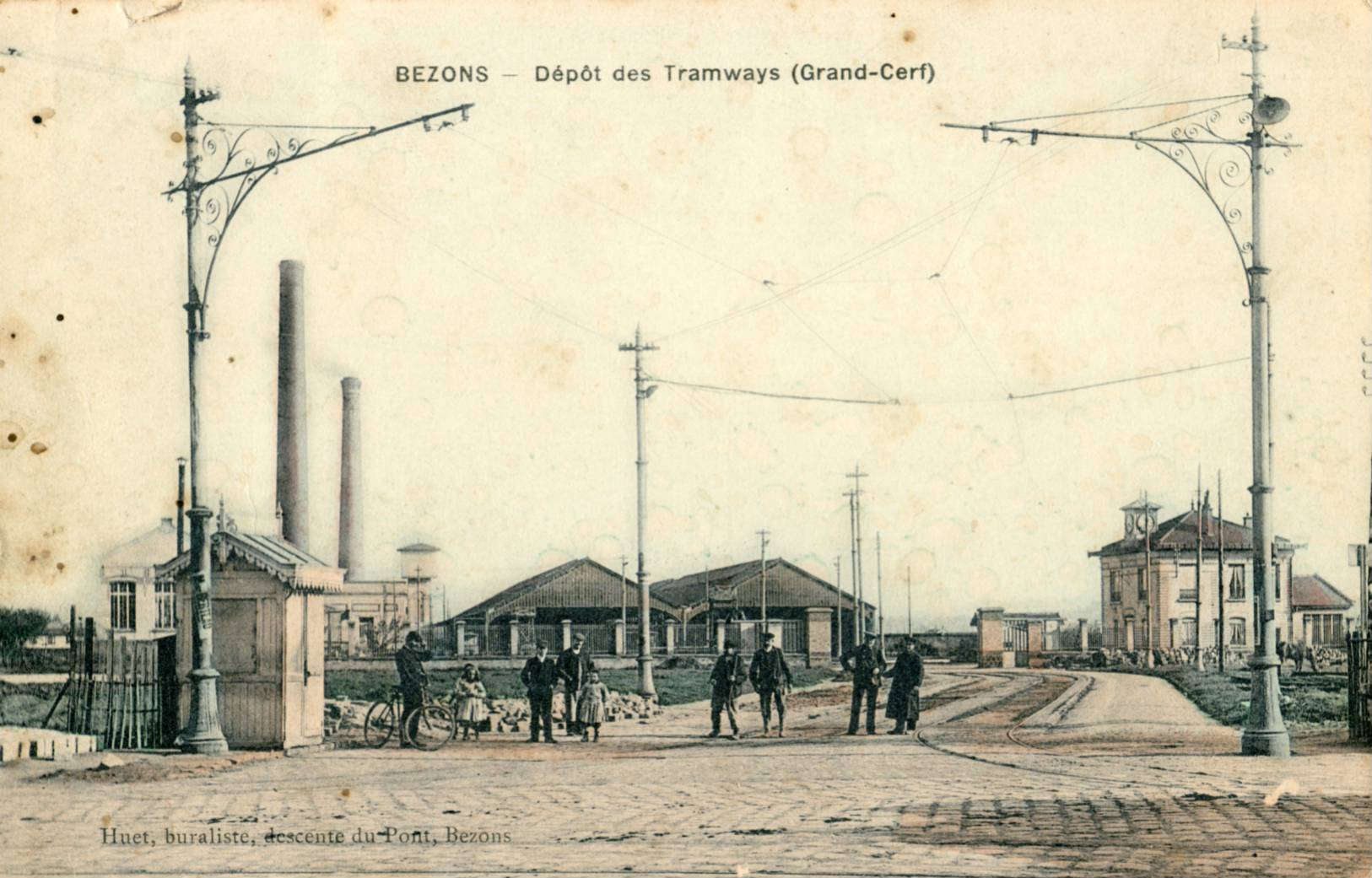 Carte postale ancienne éditée par Huet BEZONS-Dépôt du tramway (Grand Cerf)